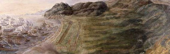 Expedición del ejército español en Orán en 1732